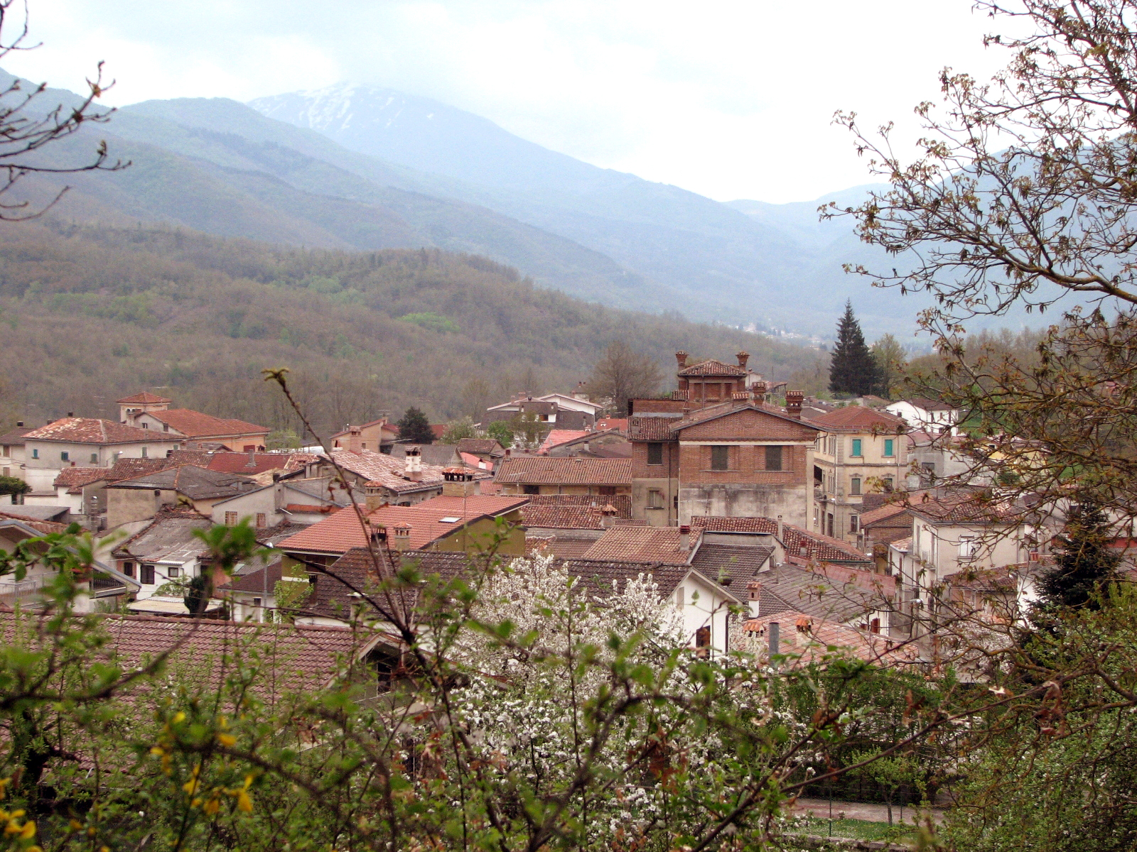 Aringo come appare in primavera da nord-est in prossimità del vecchio sentiero che conduceva in passato fino a S. Lucia